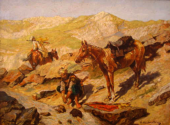 Postój przy strumieniu